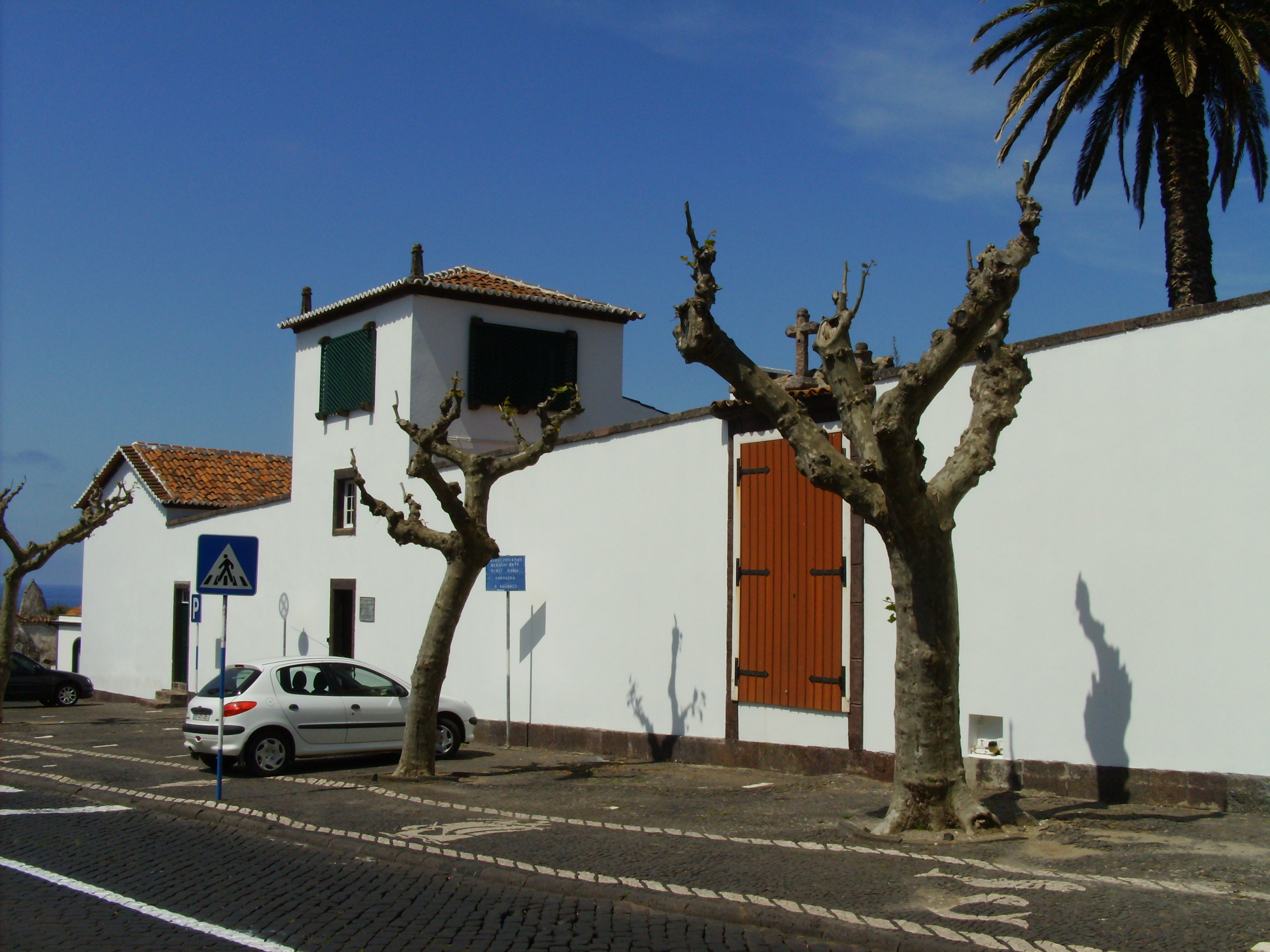 Igreja do Recohimento de Santa Maria Madalena, Vila do Porto, ilha de Santa Maria, Açores.